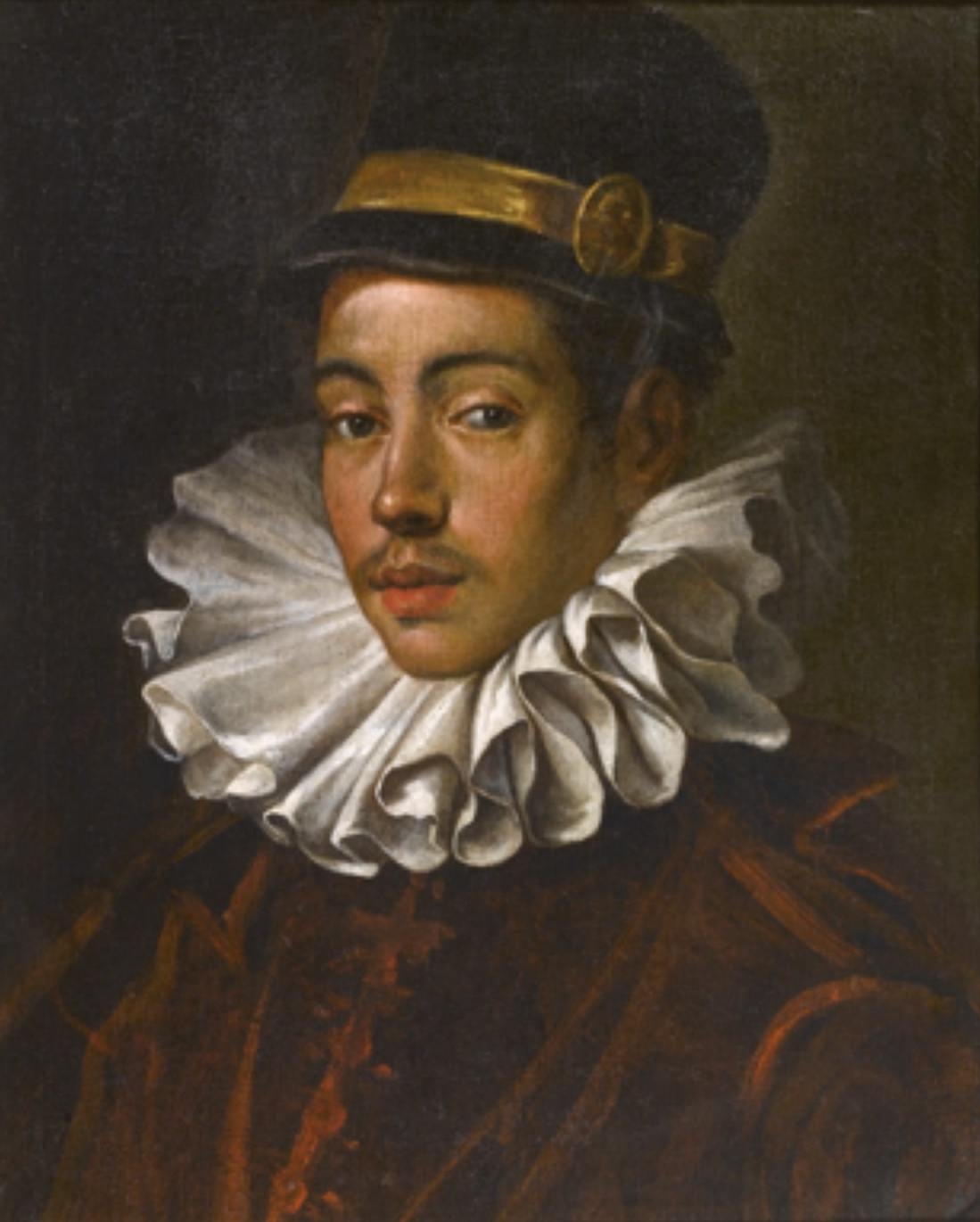 伊東マンショ(16歳頃)の肖像画。ドメニコ・ティントレット筆。 1585年に使節団がヴェネツィアを訪れた際、元老院がヤコポ・ティントレットに製作を依頼。その後ヤコポの息子ドメニコが仕上げたものと見られている。